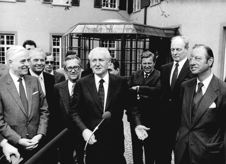 ADN-ZB Link 8.5.1980 BRD-Besuch G. Mittag Günter Mittag, Mitglied des Politbüros des ZK der SED und Mitglied des Staatsrates der DDR, hielt sich vom 16.-18.4.1980 zu Gesprächen in der BRD auf. Nach einem Besuch der Messe in Hannover führt er verschiedene Unterredungen mit dem BRD-Kanzler Helmut Schmidt sowie mit weitern führenden Politikern der BRD. Den Abschluß seines Aufenhaltes bildet ein Besuch bei der Firma Hoechst in Frankfurt-Main. UBz. Nach der Besichtigung eines Betriebsteiles der Firma Hoechts in Frankfurt.Main beantwortete Günter Mittag (4.v.l.) Fragen von Journalisten. (Unser Foto zeigt weiter das Vorstandsmitglied der Hoechst AG Willi Hoerkens 1.v.l., den Leiter der Ständigen Vertretung der DDR in der BRD, Botschafter Ewald Moldt 2.v.l., das Mitglied des Ministerrates der ddr Staatssekretär Dr. Gerhard Beil 3.v.l. und den Vorstandsvorsitzenden der Hoechst AG Dr. Rolf Sammet 1.v.r.)